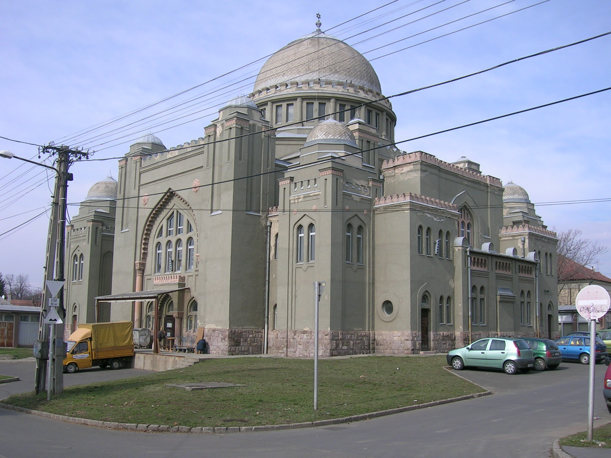 Gyöngyös, Hungary: synagogue